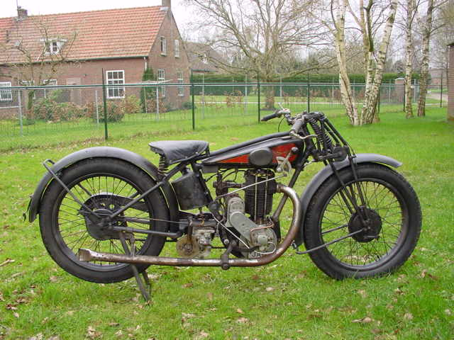 Toestemming van Yesterdays Antique Motorcycles (